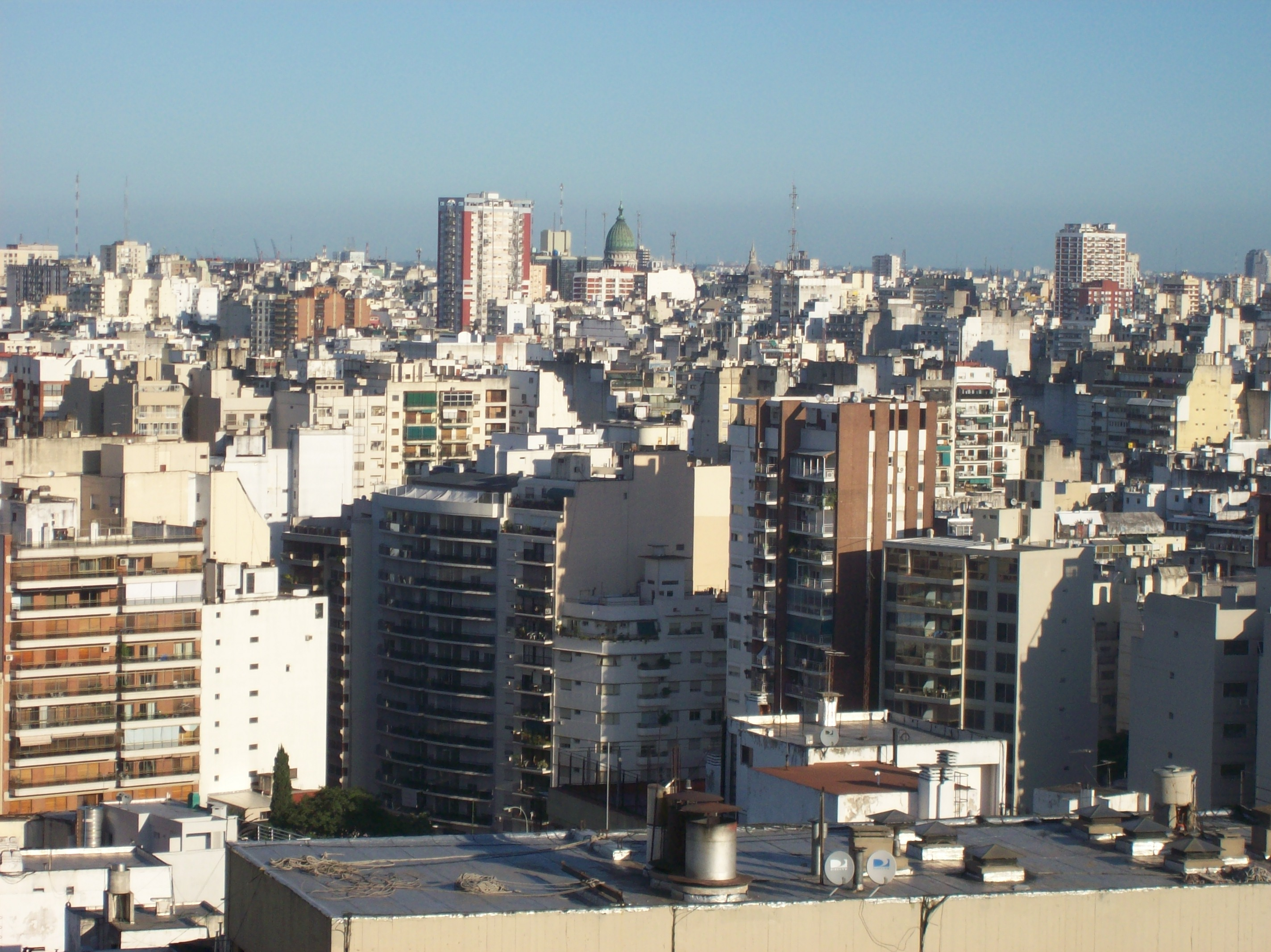 Edificación compacta en el barrio de Balvanera, Buenos Aires, vista desde la inmediaciones de la Plaza Monseñor de Andrea (Av. Córdoba y Anchorena). En el centro de la imágen, la cúpula del Congreso de la Nación Argentina.